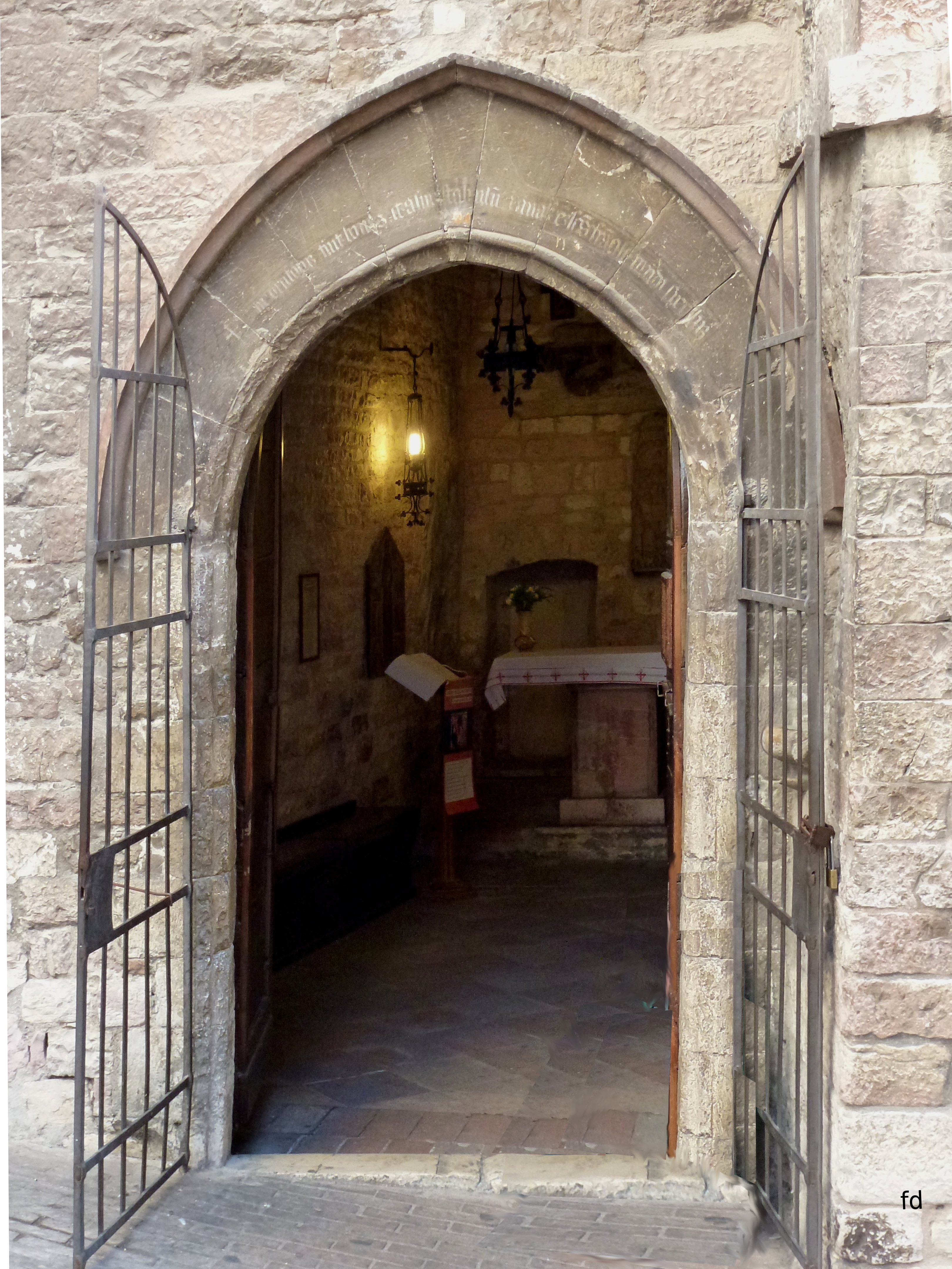 Nach einer Legende die Geburtstätte des Hl.Franz